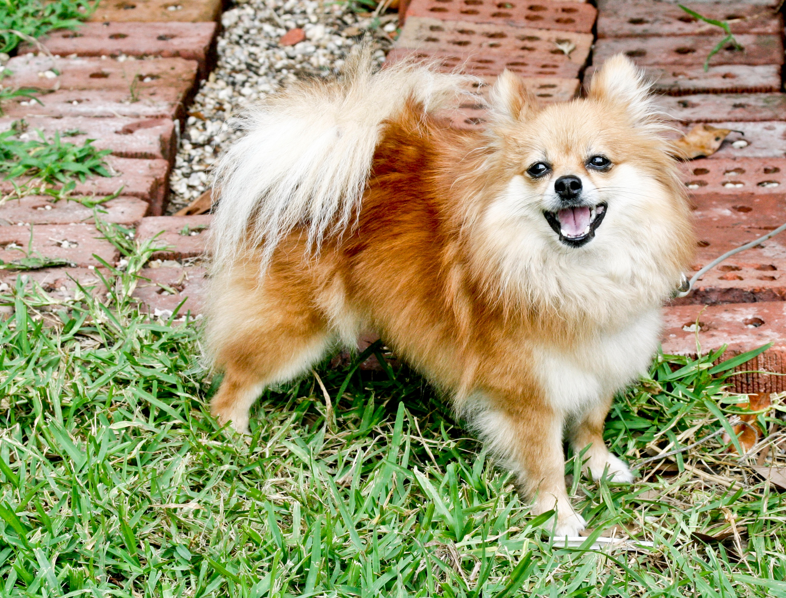 A Pomeranian.